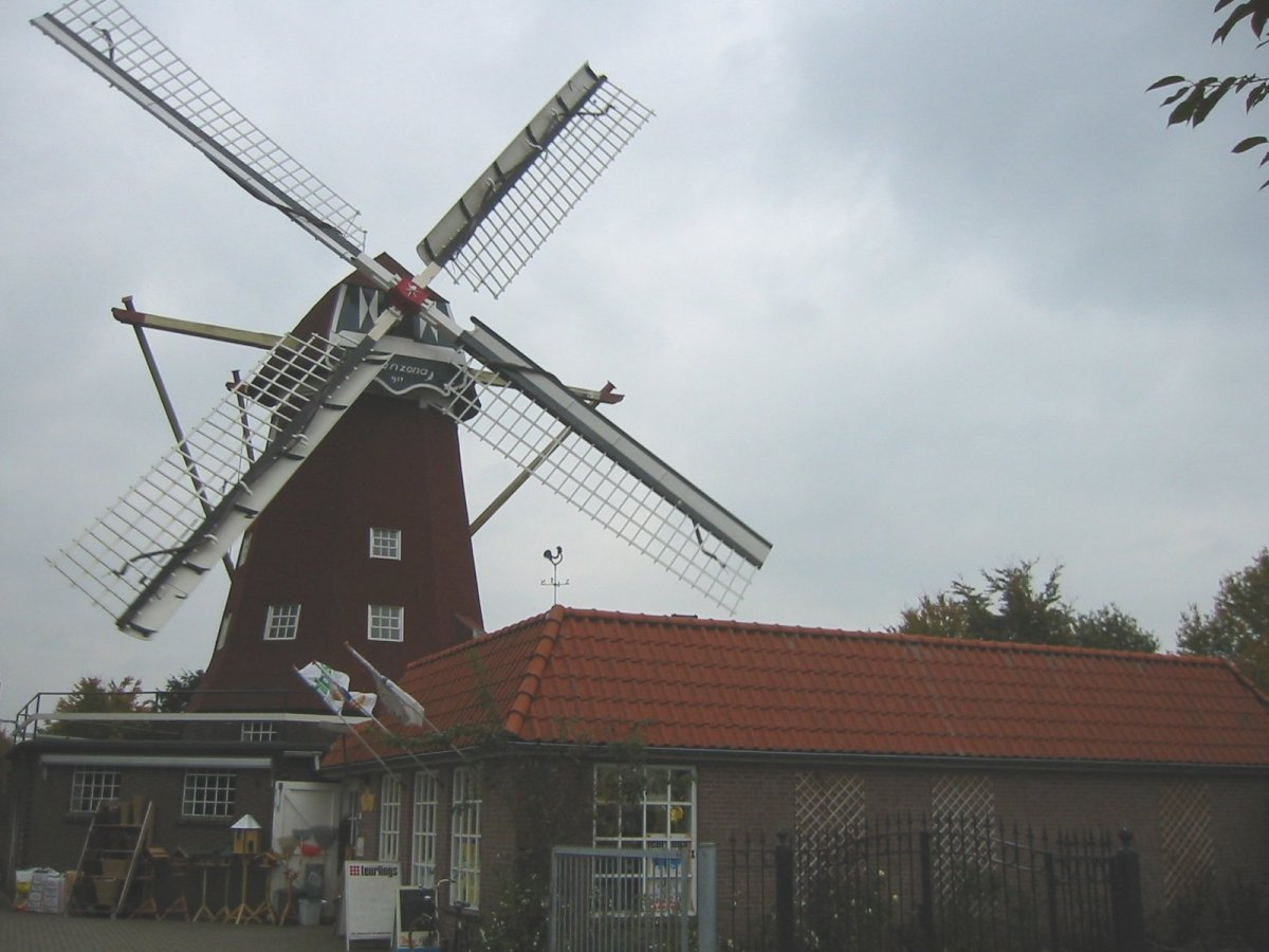 Janzona/ Ten-Bruggencatenummer: 06396: Achtkante beltmolen van voren gefotografeerd (opmerking: Foto gemaakt in het kader van het project Actualisering Monumentenregister (AMR).)